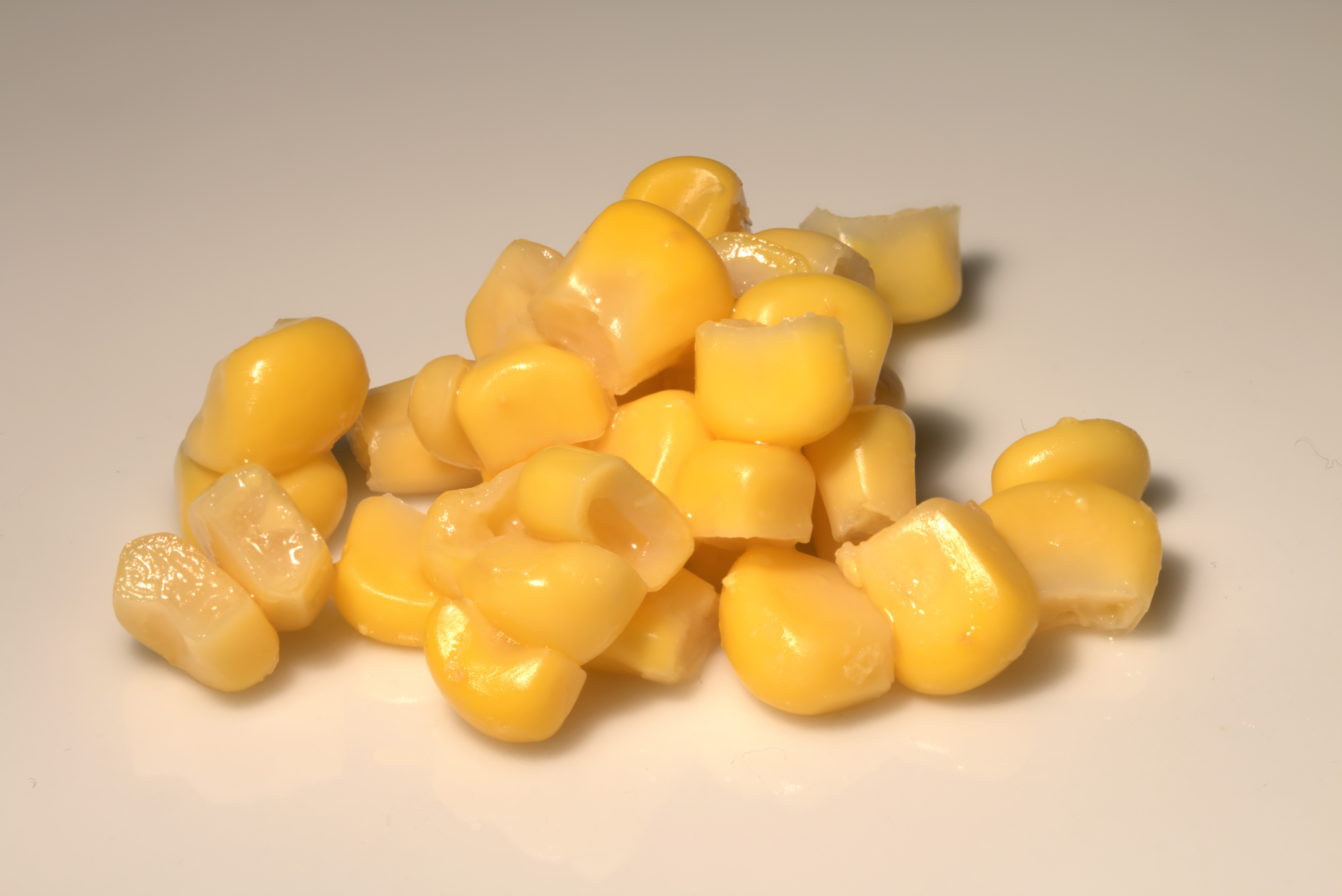 Maiskörner